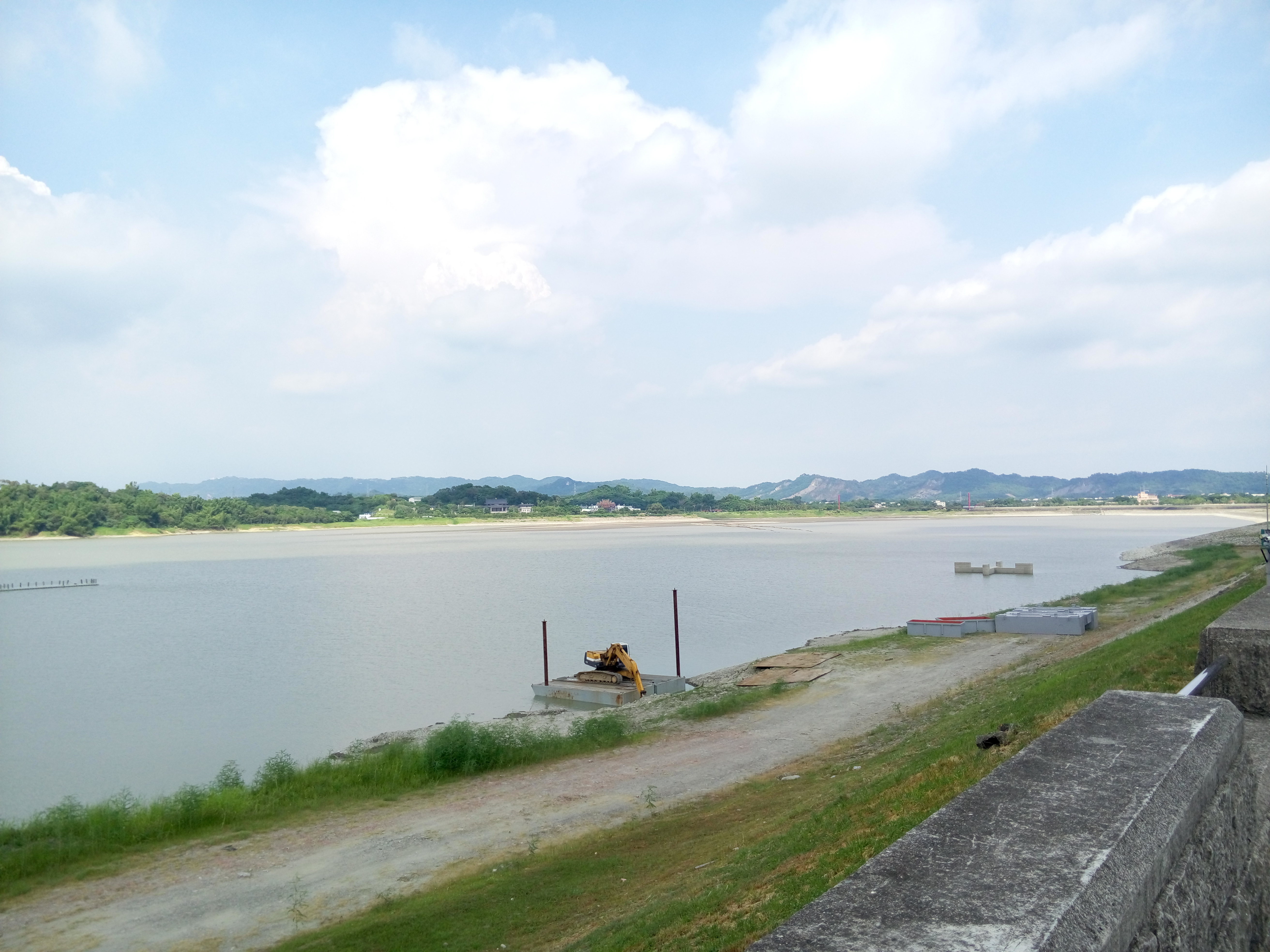 臺灣高雄市阿公店水庫大壩